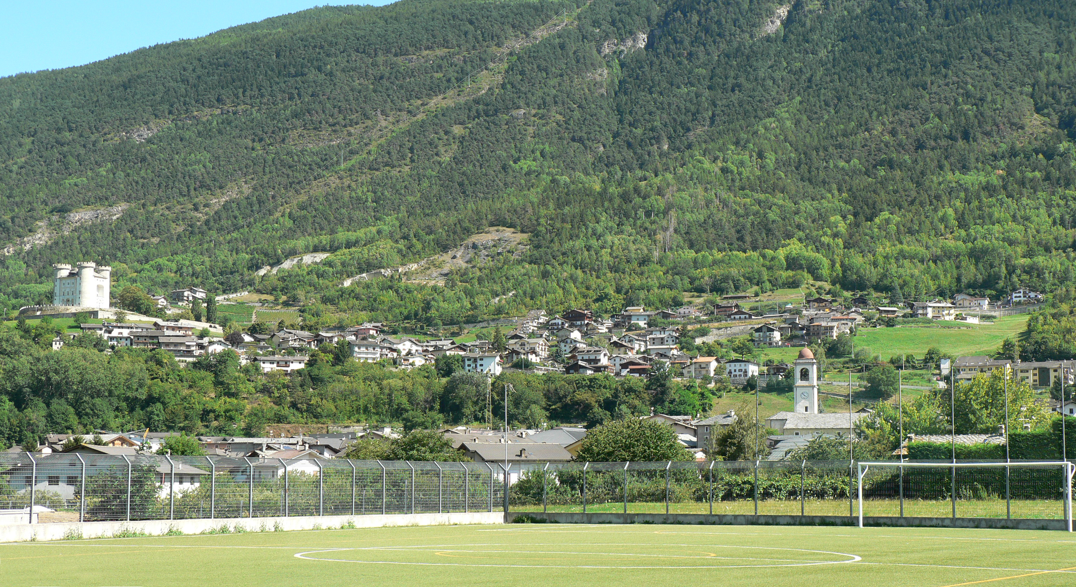 panorama di Aymavilles dal campo sportivo. Aymavilles, Valle d'Aosta, Italia.